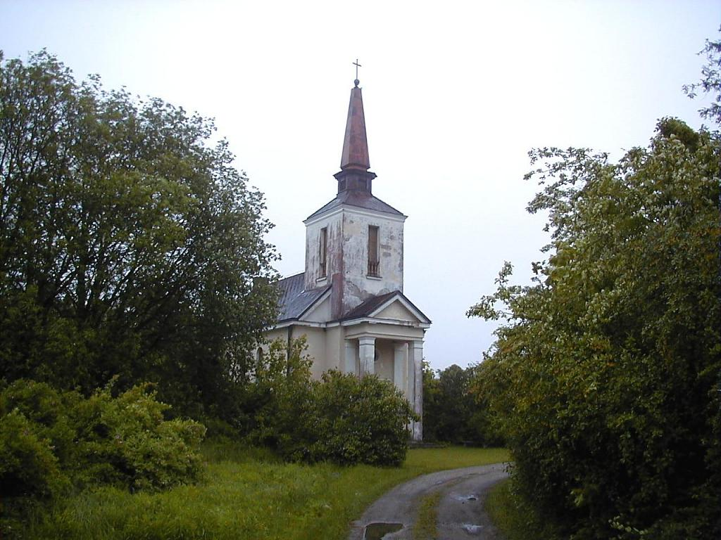 Leprozorija luterāņu baznīca Stūrīšos 2004-06-12